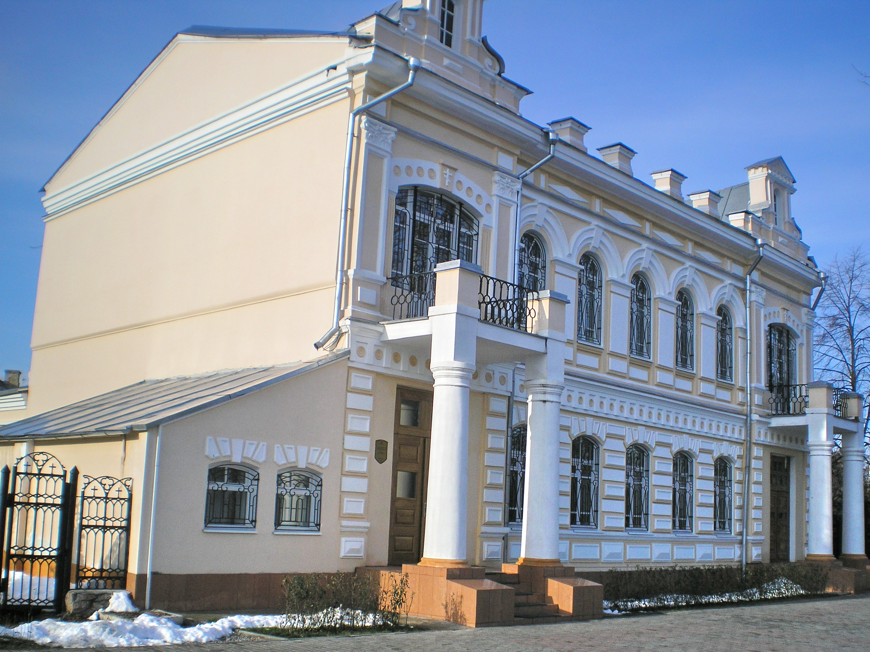 Епархиальное управление Гомельской и жлобинской епархии. ГомельResidence of Orthodox Bishop in Gomel